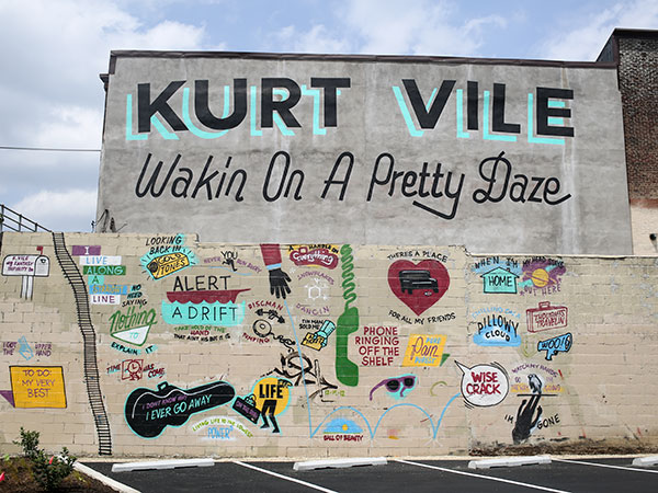 Il murales di Wakin on a Pretty Daze dopo la restaurazione.